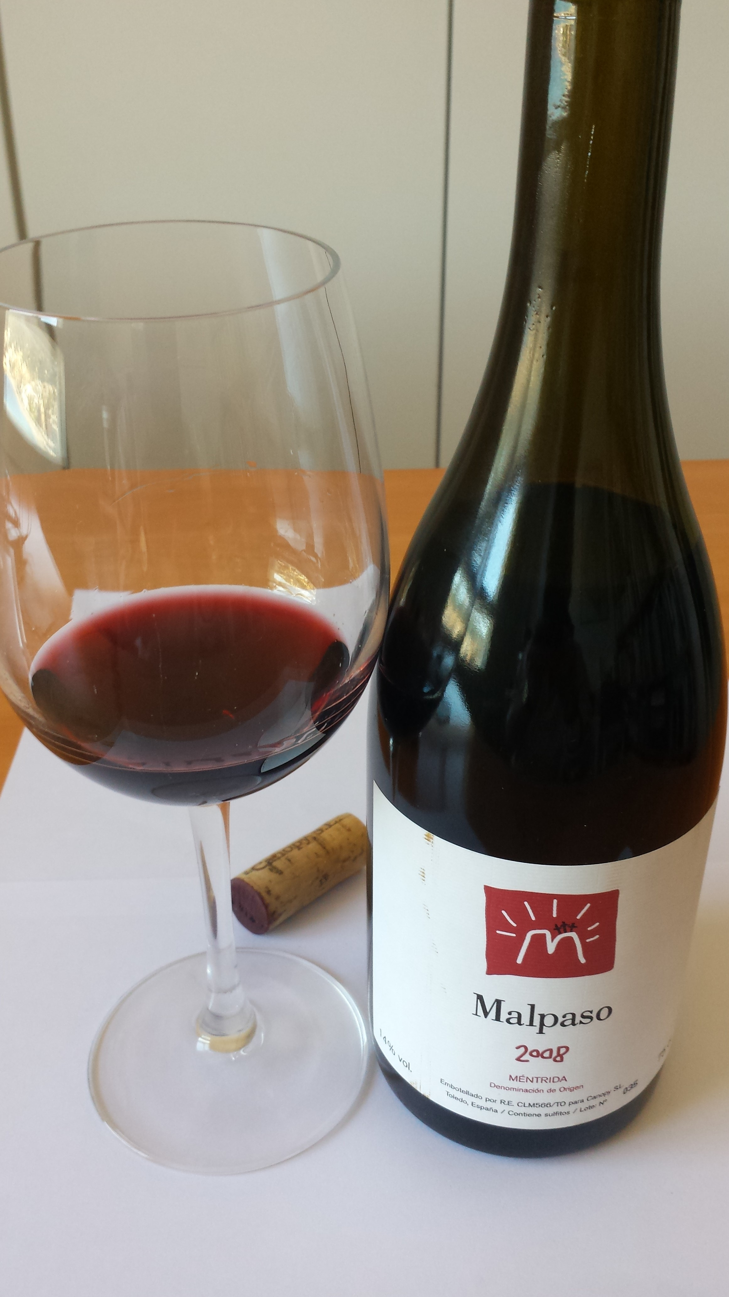 Un vino 100% Syrah, Méntrida, Toledo, España.